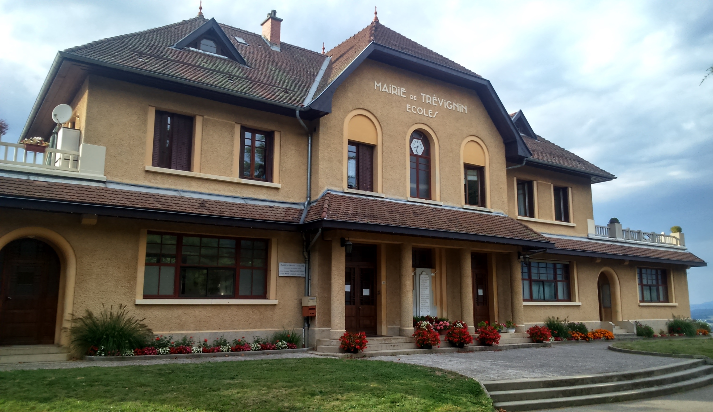 L'hôtel de ville et l'école de Trévignin (Savoie).